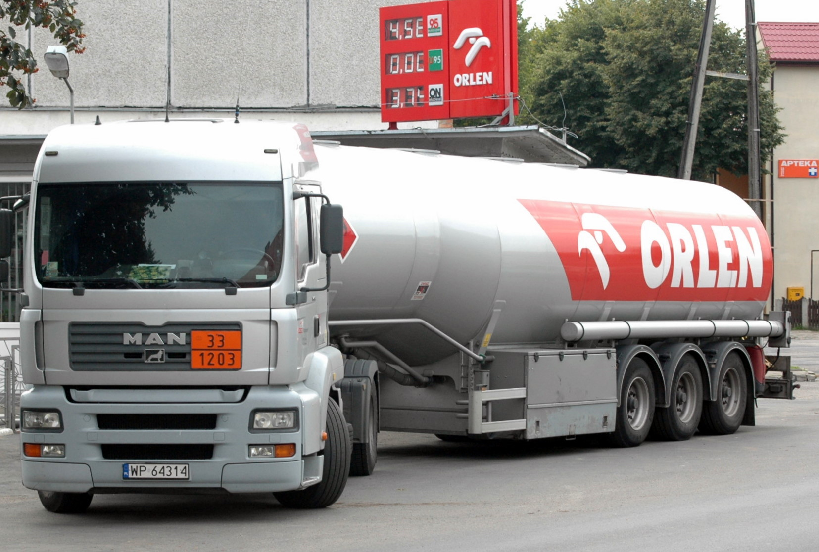 MAN TGA w malowaniu Orlenu w Wolinie.